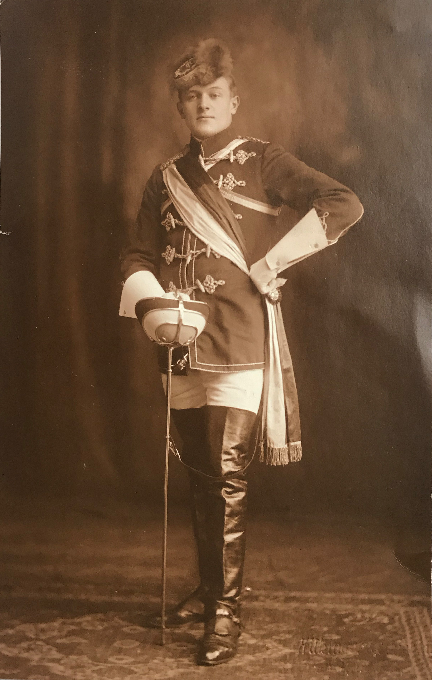 Student (Fuchsmajor) der Verbindung KBStV Rhaetia München. (Aufnahme Wintersemester 1924/25). Abfotografiert vom Originalabzug.